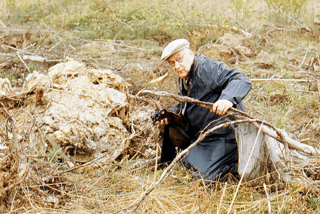 luonnonsuojelia